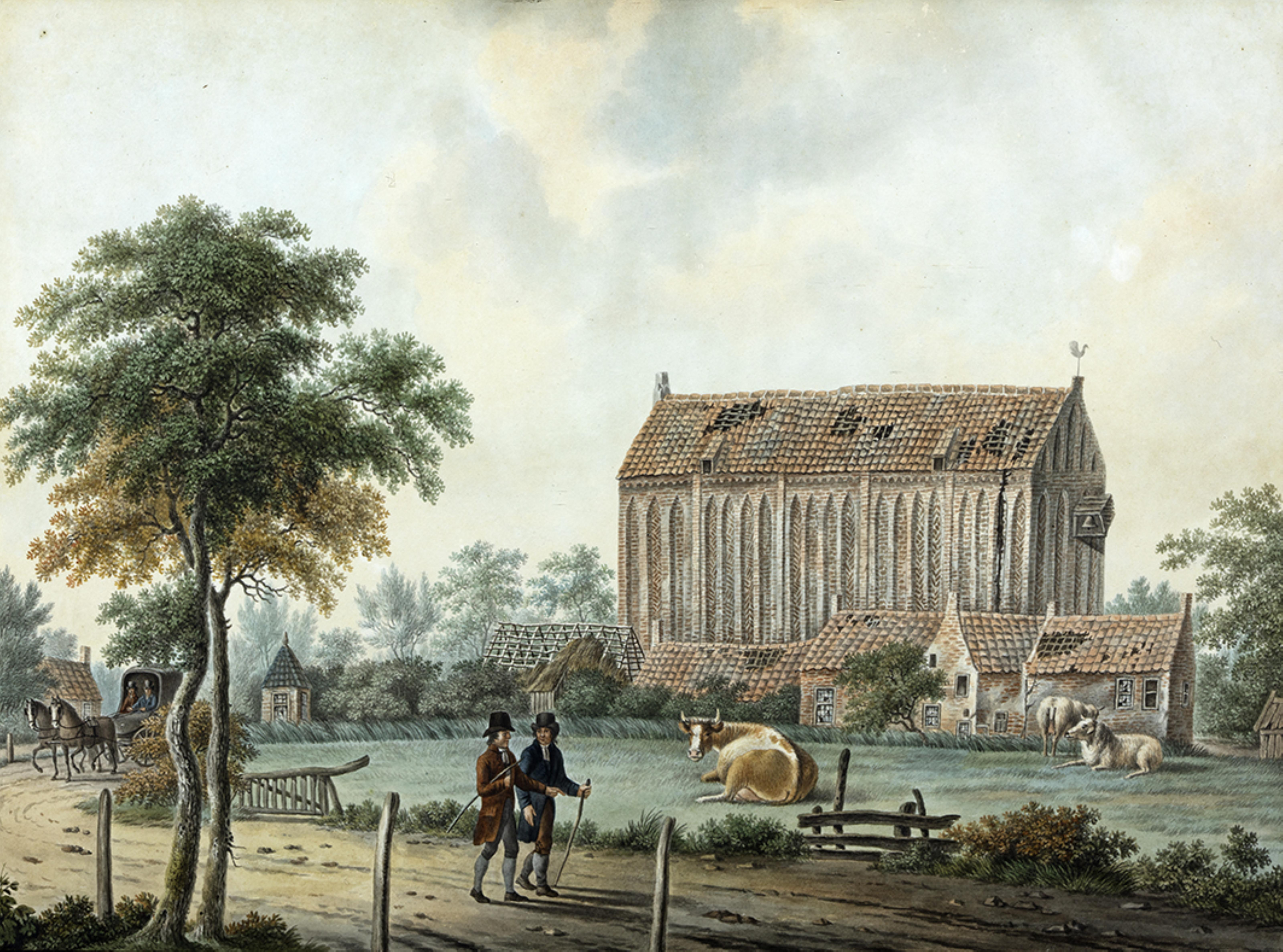 Noordzijde van de kerk te Scharmer met pastorie, school en onderwijzerswoning, kort voor de afbraak in 1824. Gemaakt in opdracht van Theunis Haakma Tresling van de veenborg Woellust te Scharmer.